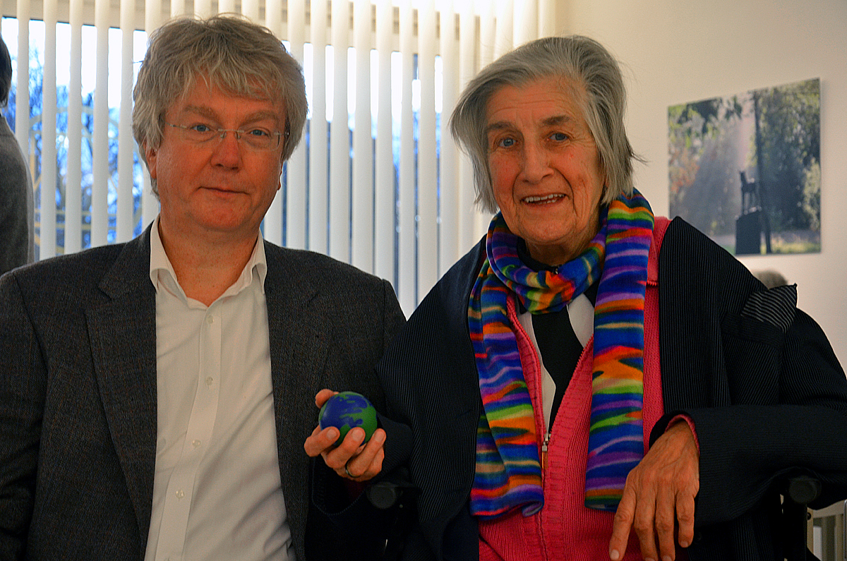 Auf Einladung des Vereins Internationale Schule des Goldenen Rosenkreuzes - Lectororium Rosicrucianum e.V. hatte Prof. Dr. Burkhard Messer von der Hochschule für Technik und Wirtschaft Berlin (University of Applied Sciences) am 20. November 2016 seinen Vortrag „Die Monadenlehre von Gottfried Wilhelm Leibniz. Eine spirituelle Interpretation“ gehalten. Das Foto zeigt den Professor nach seinem Vortrag im Zentrum Hannover der Rosenkreuzer in der Striehlstraße 29 an der Seite der Verlegerin Gabrielle Spaeth ...